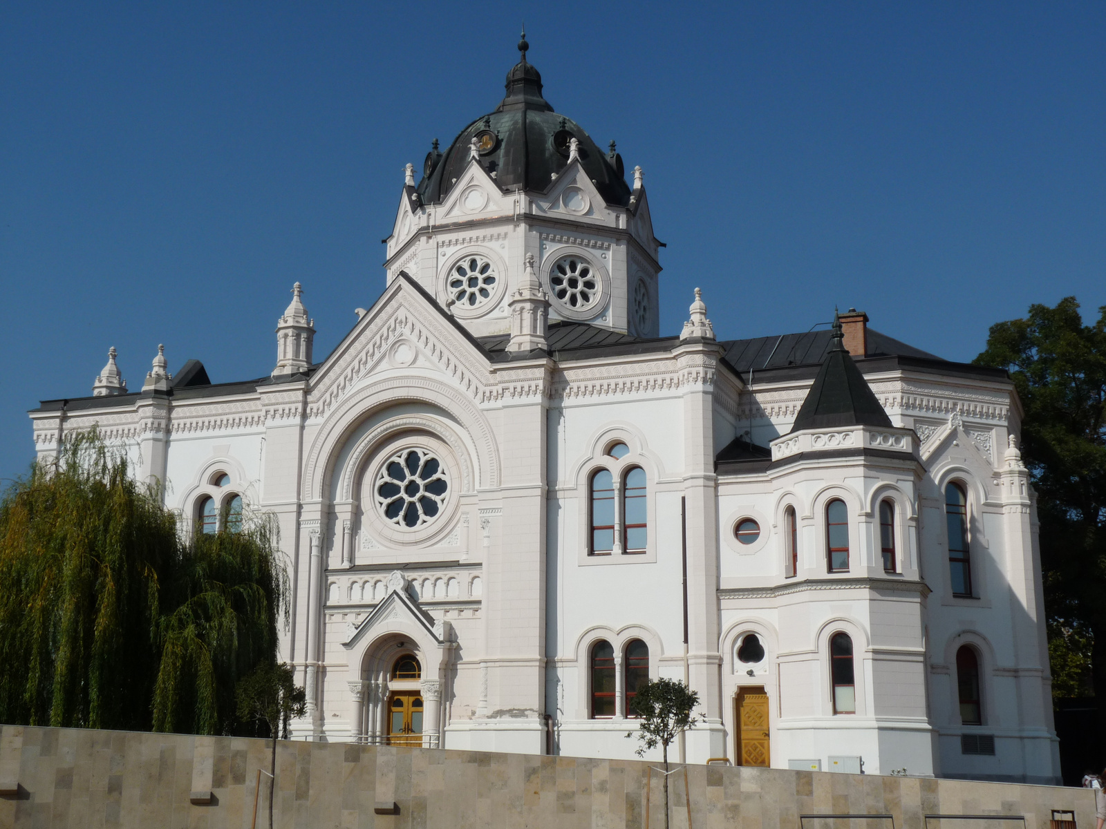 zsinagóga (Szolnok, Templom út 2.)